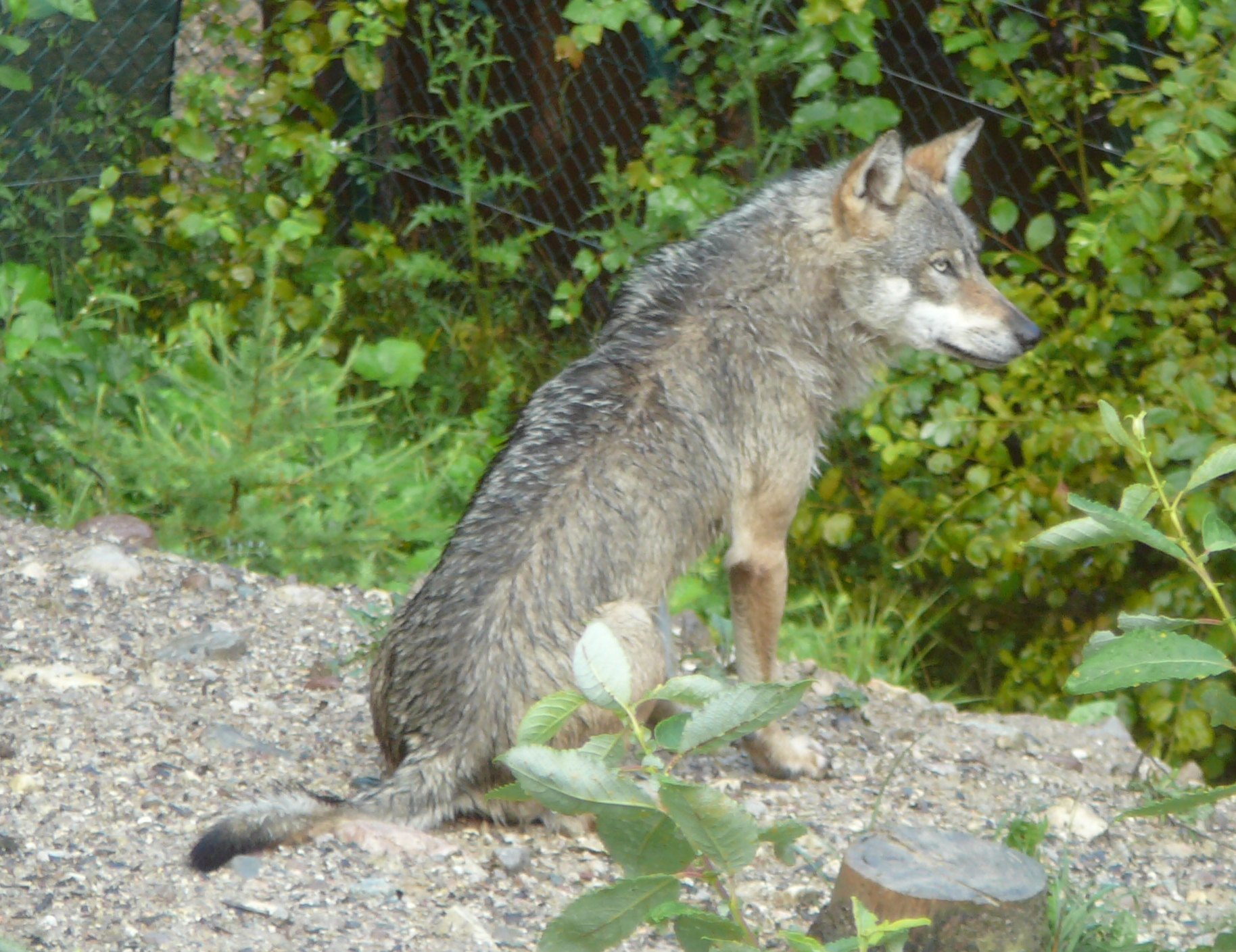 Lupo presso Parco Faunistico Spormaggiore